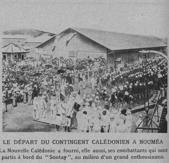 publié dans le magazine le Miroir n° 82